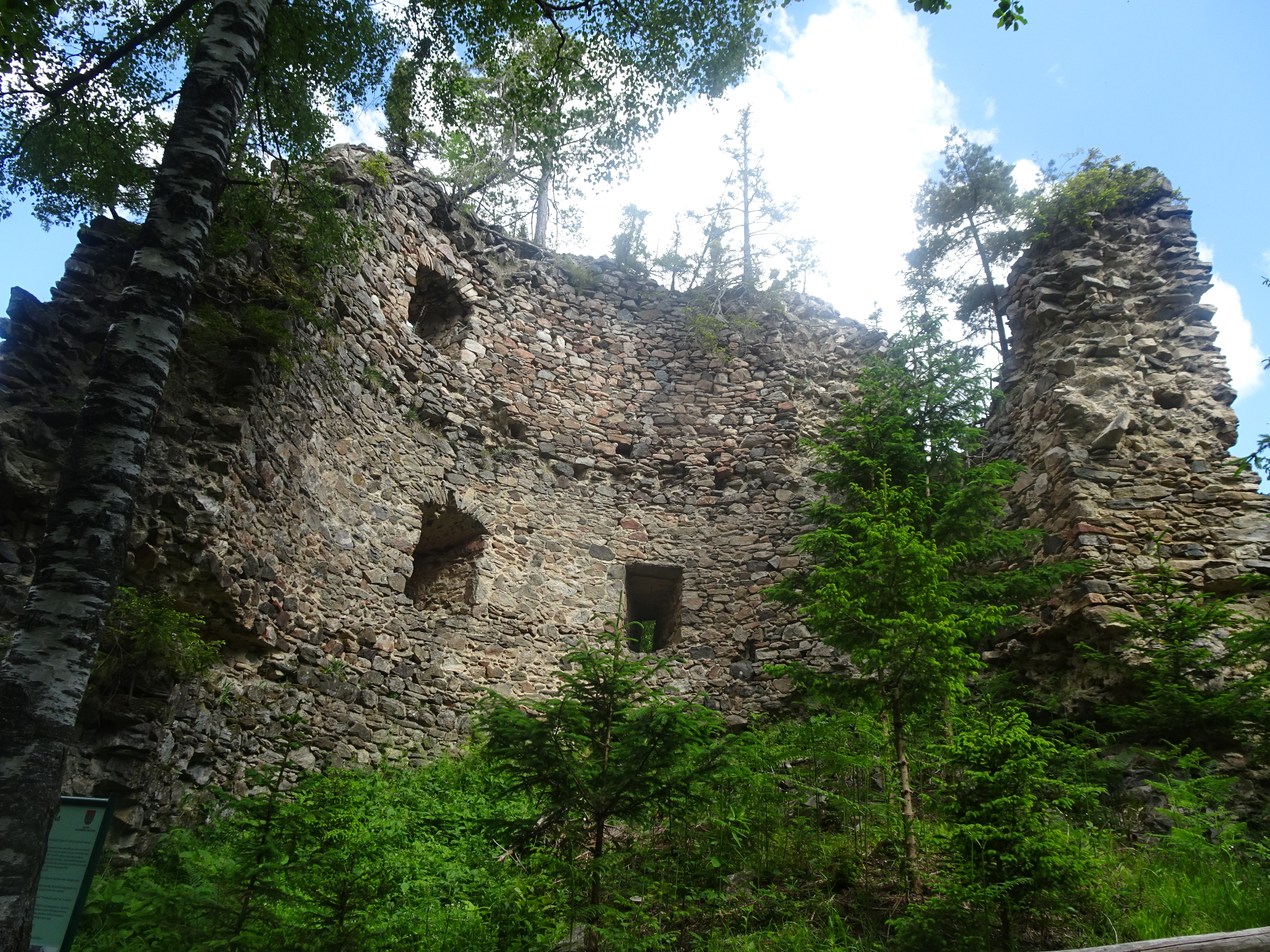 Kebelj, Slovenia